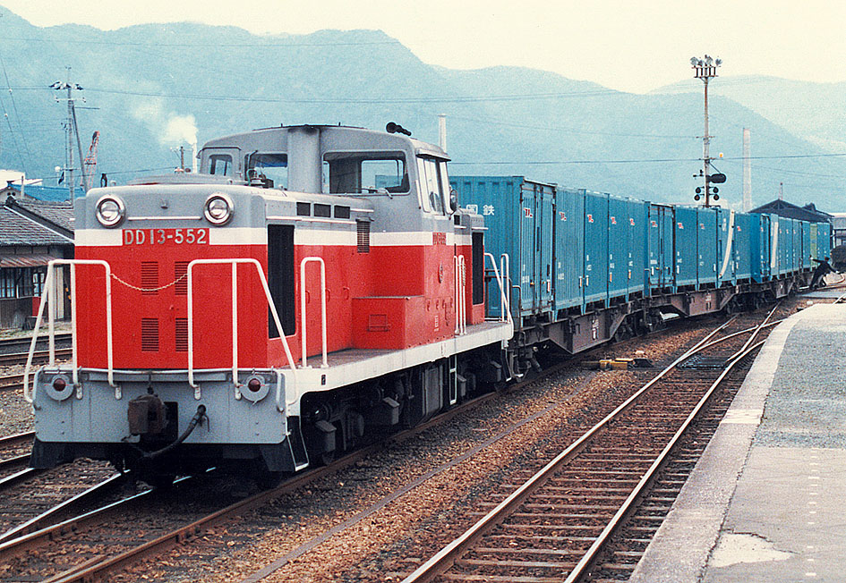 同和鉱業片上鉄道 片上駅でコンテナ貨物列車を入換するDD13-552